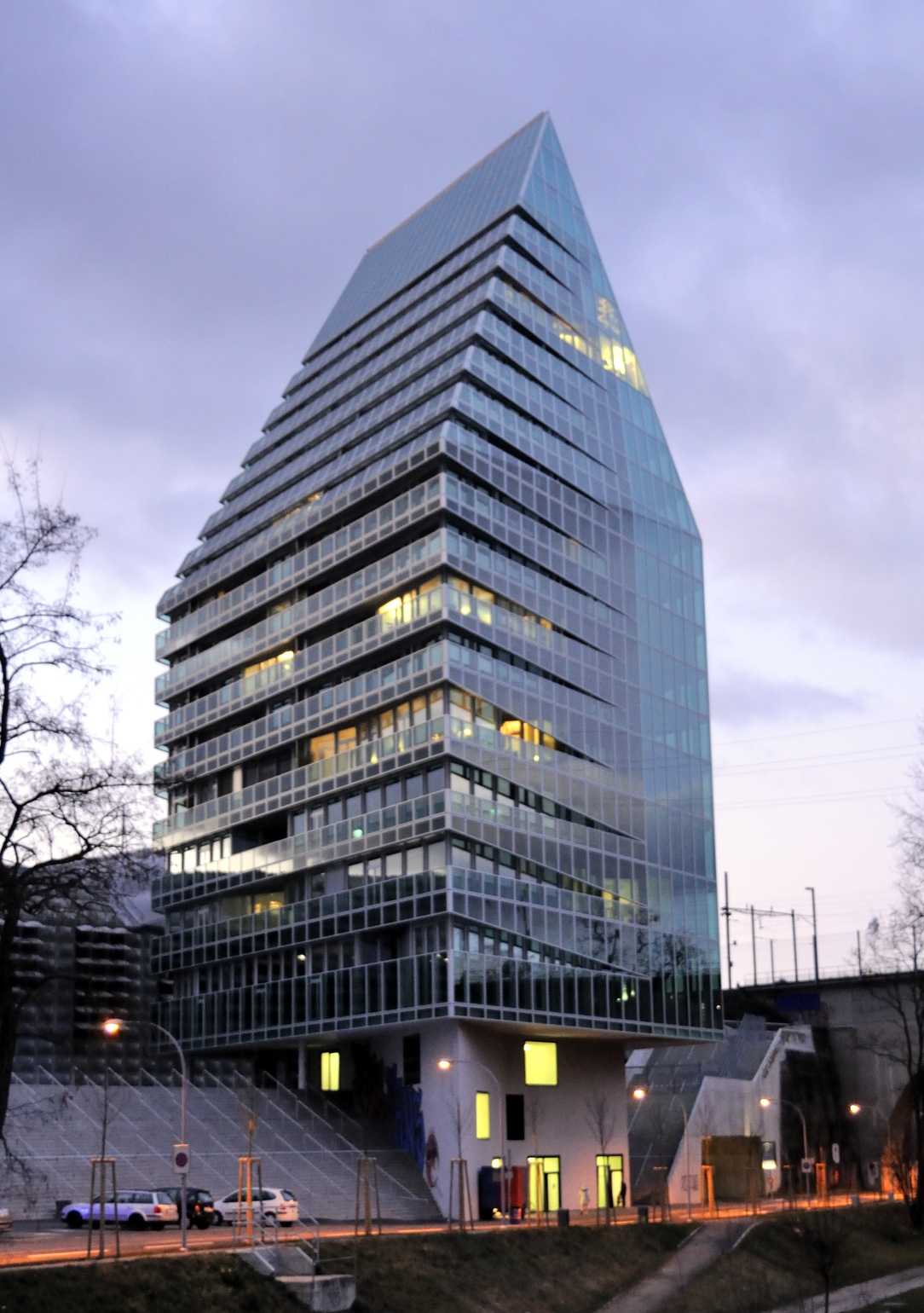 St. Jakobs-Turm, Basel